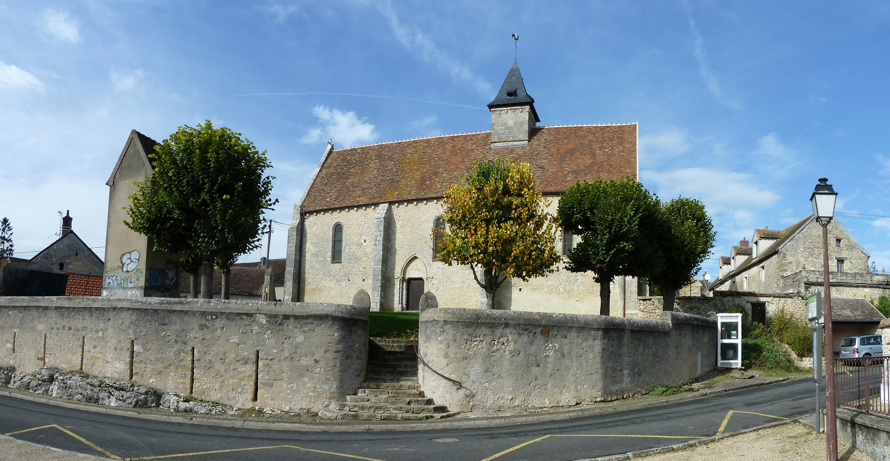 Église Saint-Mammes de Montarlot, (Classé, 1908) Cet édifice d'une grande simplicité présente une originalité: entre la nef et le chœur s'élève un clocher carré, tout de pierre sans ouverture. Il est à l'origine surmonté d'un beffroi du XIIIè siècle. Le poids excessif de l'ensemble nécessite un étayage formé de quatre colonnes.